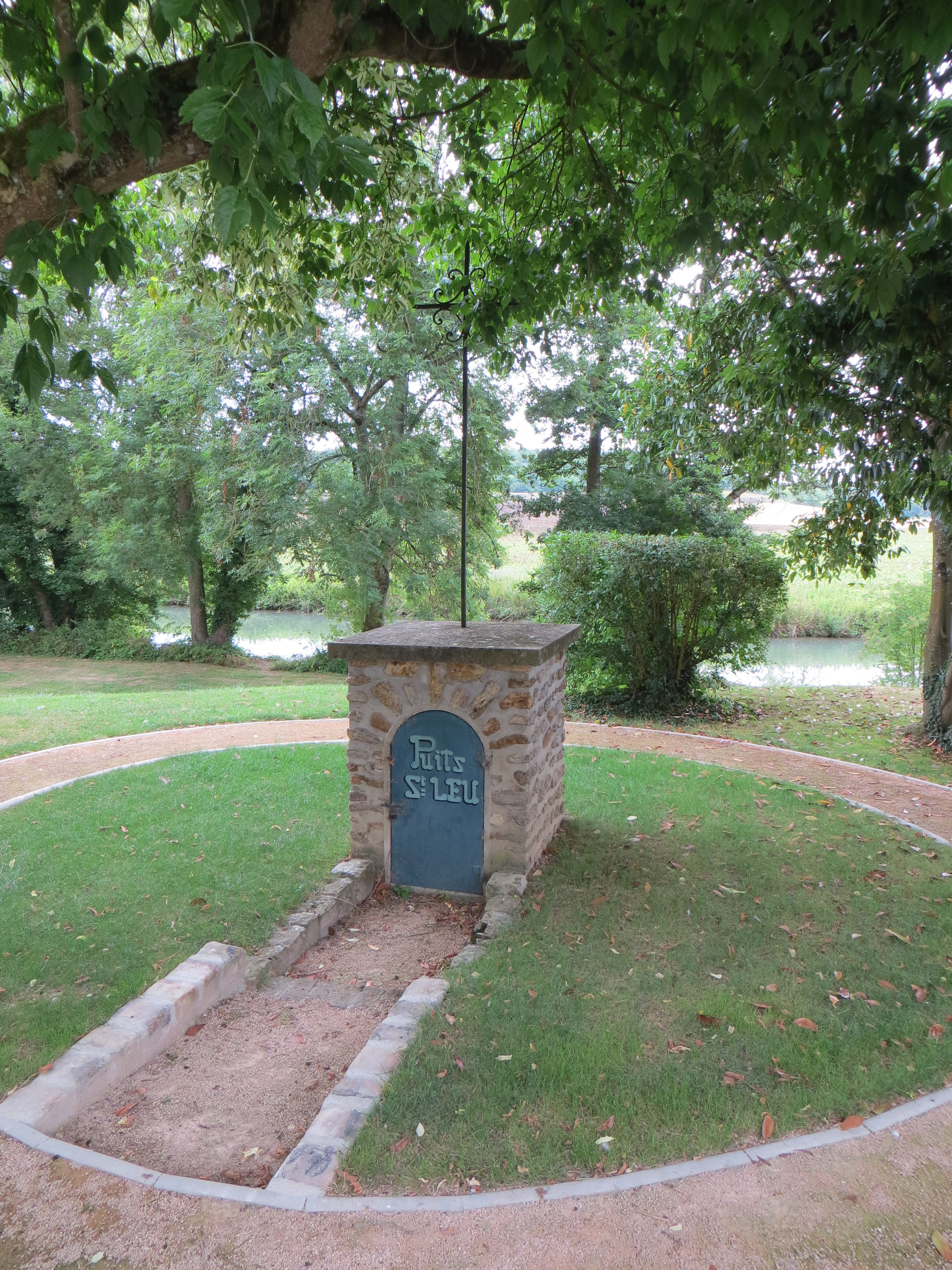 Puits Saint-Leu en contrebas de l'église du même nom